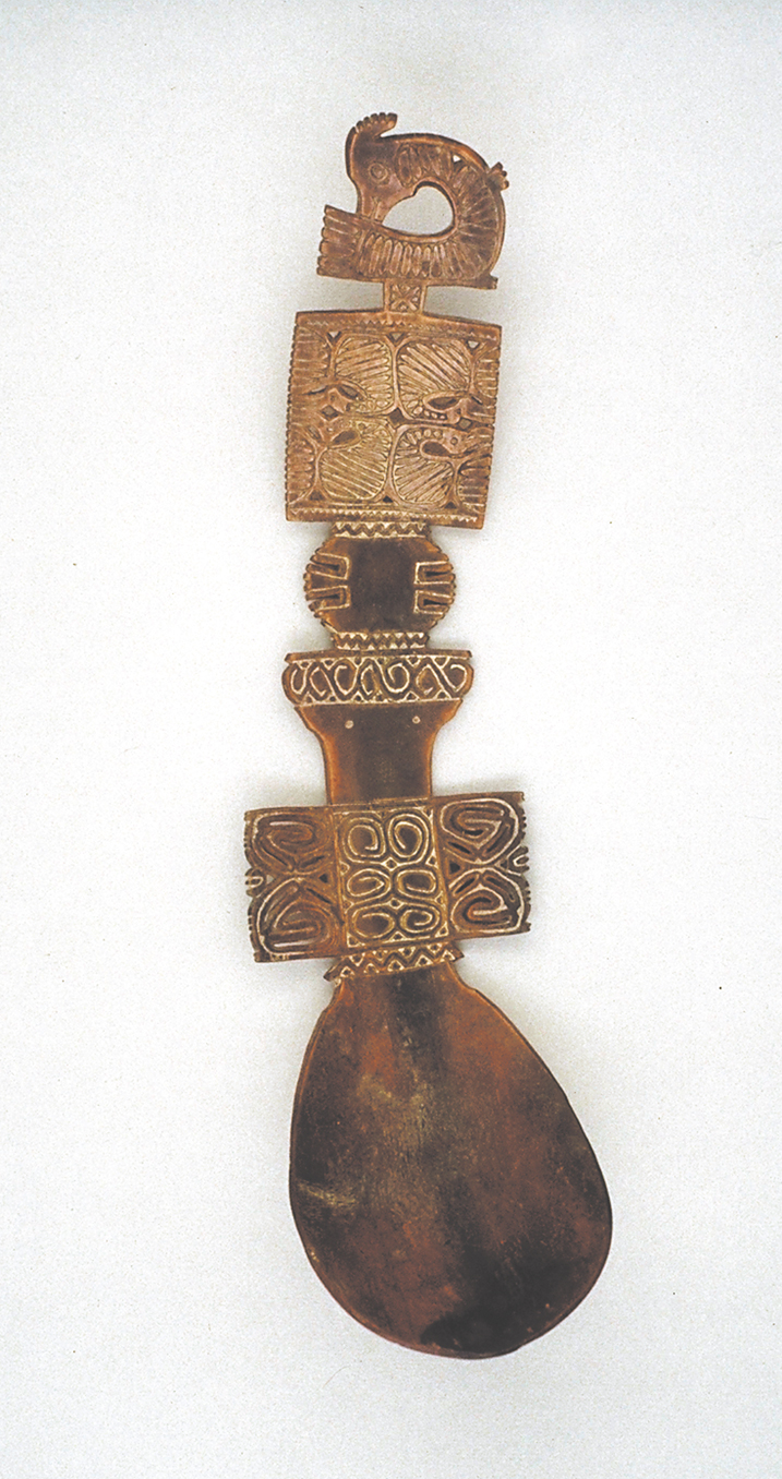 Colección de cucharas y utensilios de Ernesto Richheimer, perteneciente al Museo Soumaya.